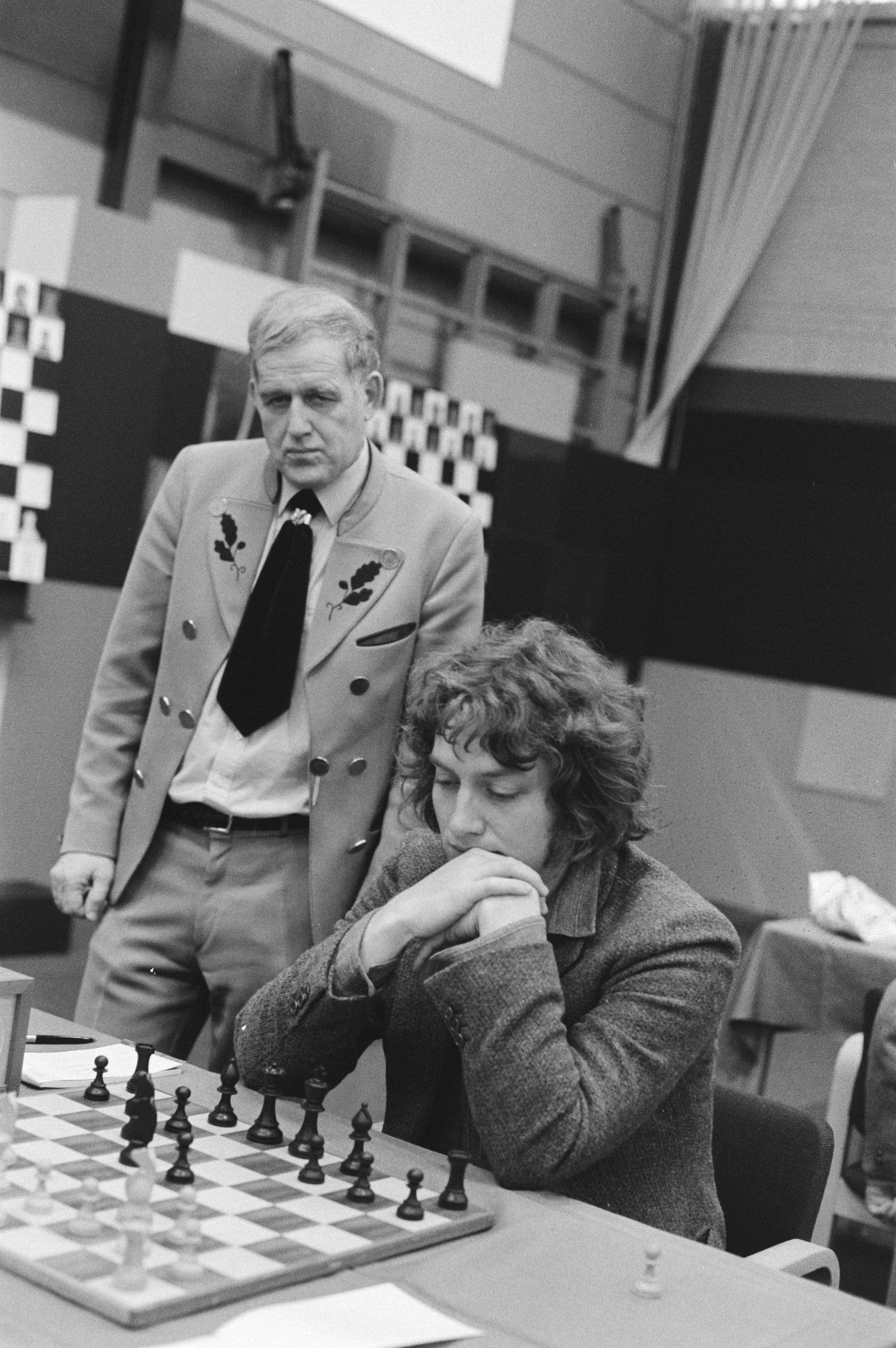 Collectie / Archief : Fotocollectie Anefo Reportage / Serie : [ onbekend ] Beschrijving : Hoogovenschaaktoernooi, eerste ronde. Timman (zittend) in aktie, de Westduitse grootmeester Unzicker kijkt mee Datum : 16 januari 1981 Locatie : IJmuiden, Noord-Holland Trefwoorden : schaken, toernooien Persoonsnaam : Timman, Jan, Unzicker, Wolfgang Fotograaf : Bogaerts, Rob / Anefo Auteursrechthebbende : Nationaal Archief Materiaalsoort : Negatief (zwart/wit) Nummer archiefinventaris : bekijk toegang 2.24.01.05 Bestanddeelnummer : 931-2632